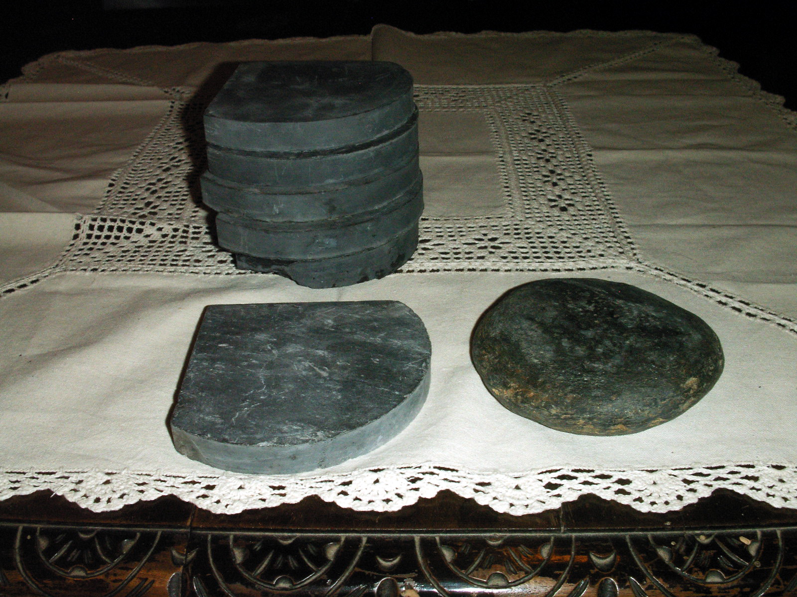 Conserva acciughe,pesi di pietra ardesia e ciotolo mare